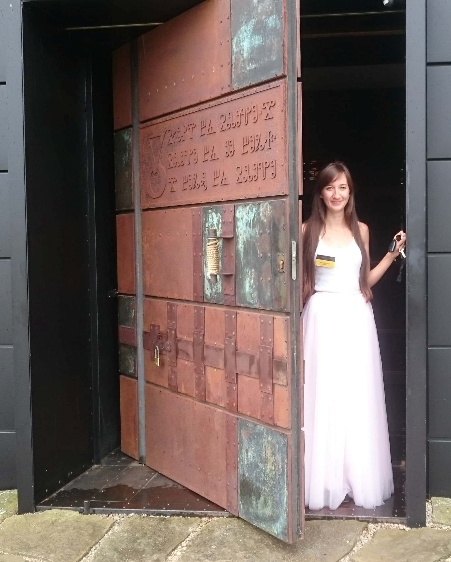 Slovanské hradiště Mikulčice-Valy. Vstup do II. pavilonu s nápisem v hlaholici: Iskoni bä slovo, i slovo bä u Boha, i Boh bä slovo (Na počátku bylo Slovo, to Slovo bylo u Boha, to Slovo byl Bůh. Jan 1,1.)